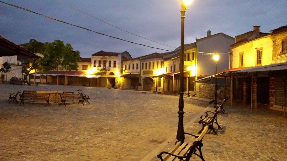 Sheshi i Pazarit Korce